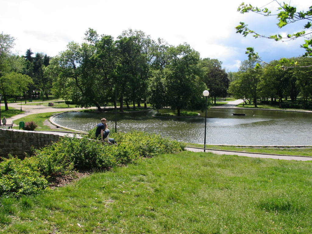 Park Staromiejski nad stawem na rzece Łódce w Łodzi